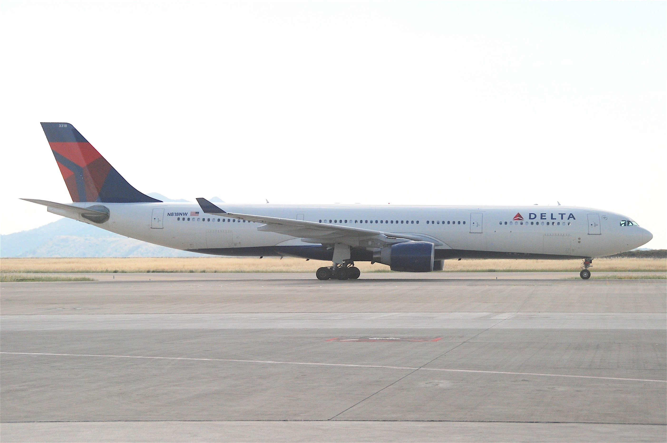 Delta Air Lines Airbus A330-323X; N818NW@ATH;12.06.2011/600ar